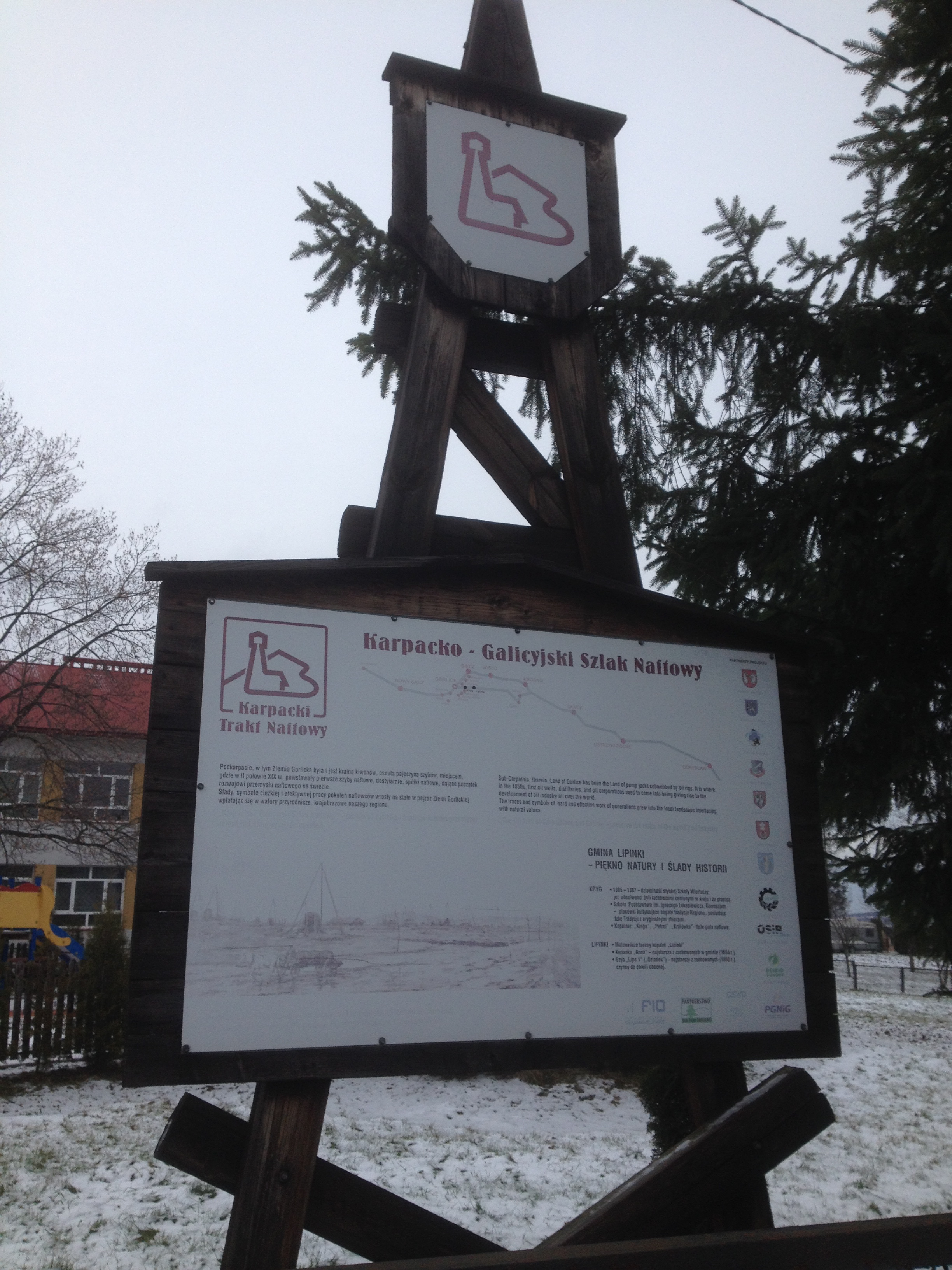 Tablica informacyjna umieszczona w centrum wsi